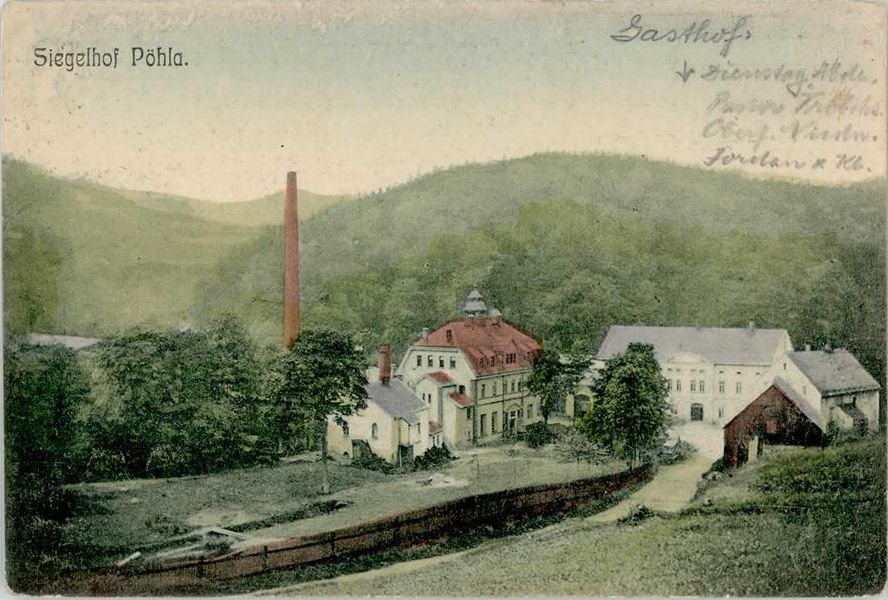 Der Siegelhof in einer Ansichtskarte von etwa 1905.